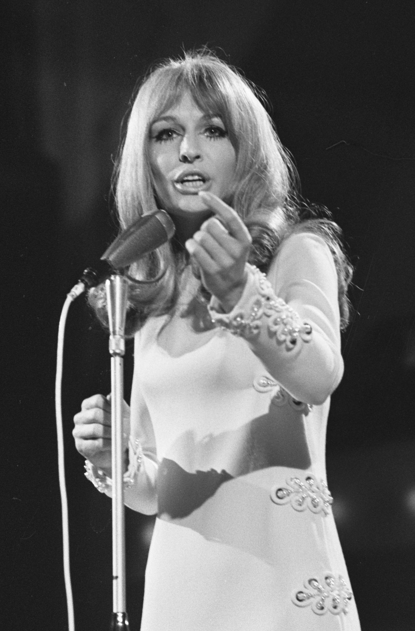 Collectie / Archief : Fotocollectie Anefo Reportage / Serie : [ onbekend ] Beschrijving : Grand Gala du Disque in RAI Amsterdam. Liesbeth List tijdens optreden Datum : 27 februari 1970 Locatie : Amsterdam, Noord-Holland Persoonsnaam : List, Liesbeth Fotograaf : Mieremet, Rob / Anefo Auteursrechthebbende : Nationaal Archief Materiaalsoort : Negatief (zwart/wit) Nummer archiefinventaris : bekijk toegang 2.24.01.05 Bestanddeelnummer : 923-3039